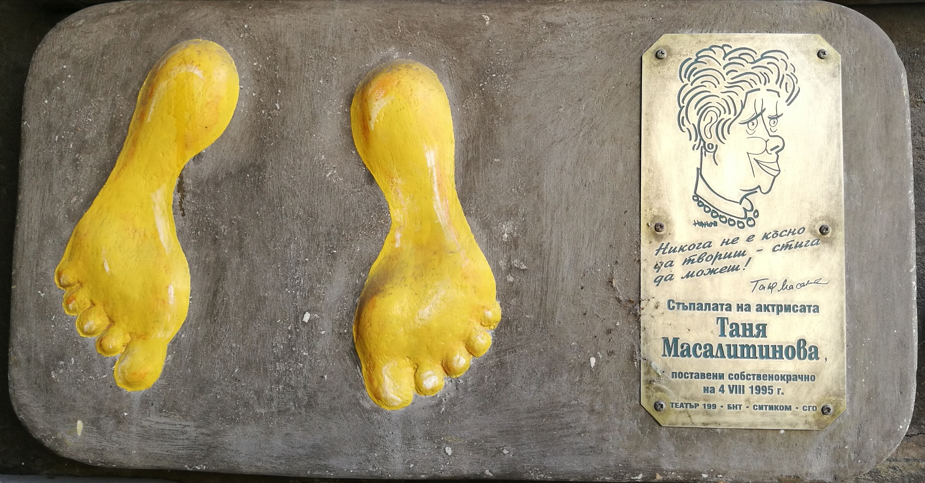 Стената на славата пред Театър 199 - пано с отпечатъци, послание и шарж на Таня Масалитинова.